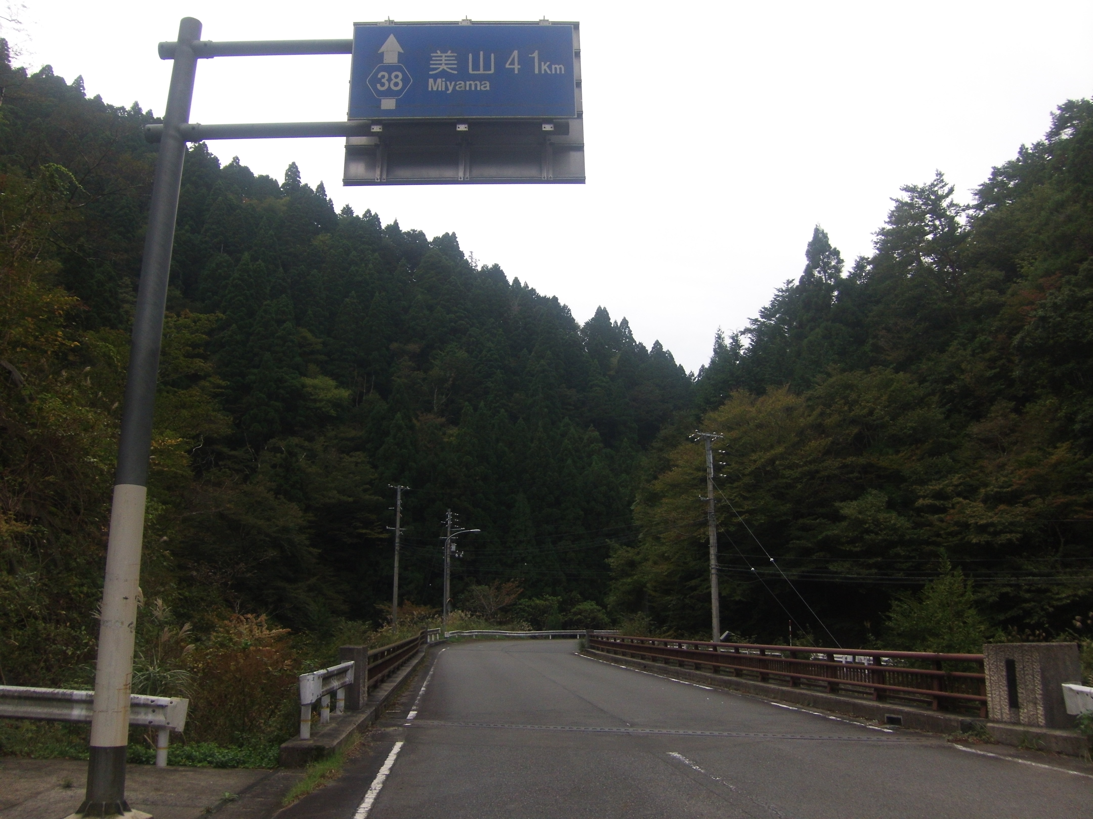 左京区広河原付近の京都府道38号線、桂川源流域に架橋